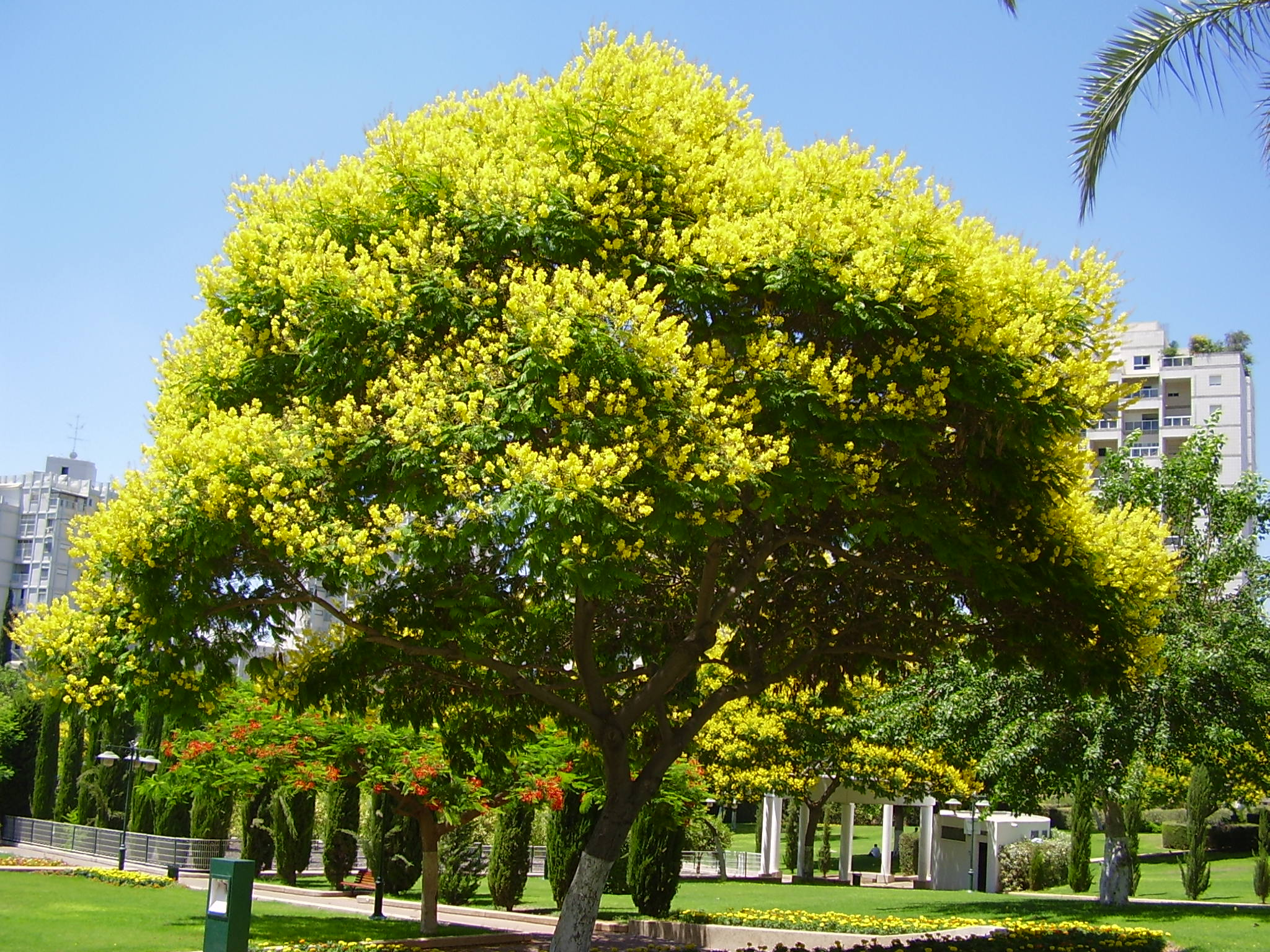 שלטית מקומטת Peltophorum dubium